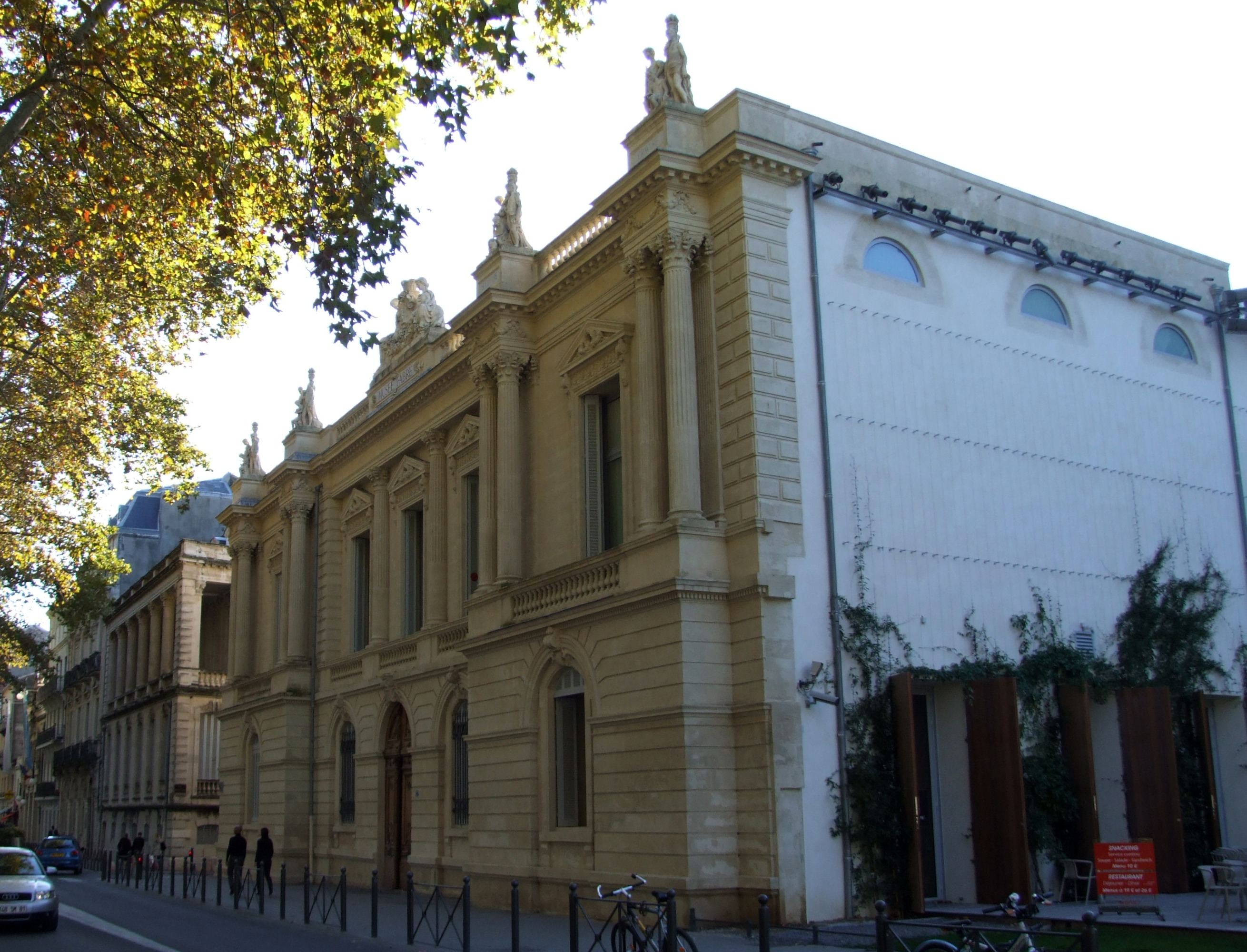 Musée Fabre, Montpellier, Hérault, FRANCE